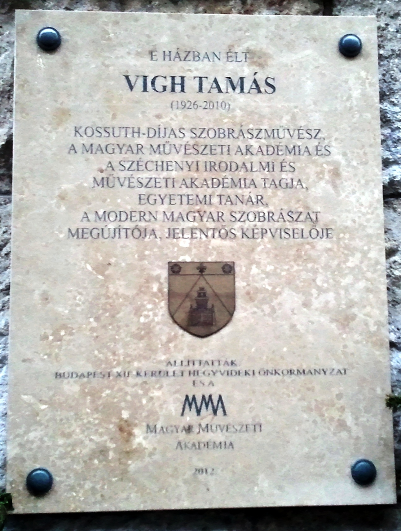 Vigh Tamás emléktábla. Budapest XII. kerület Városmajor utca 16